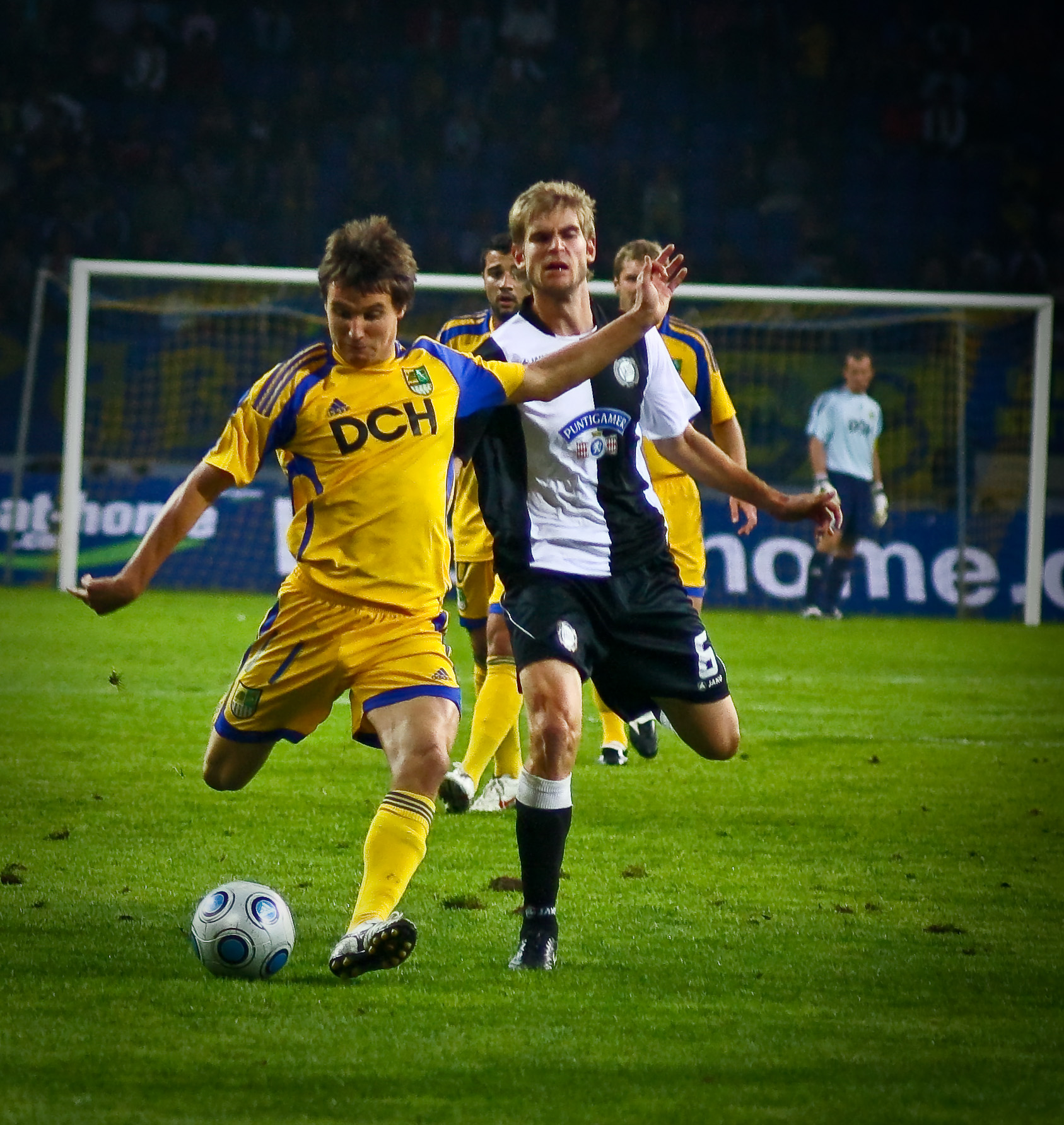 Денис Олейник